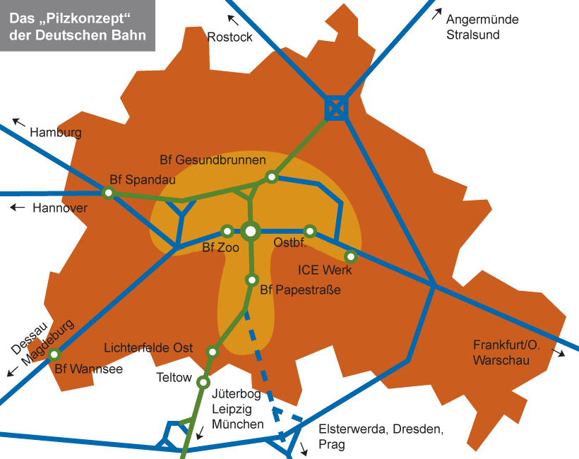 Bahnstrecken und Bahnhöfe zum Pilzkonzept der Deutschen Bahn für Berlin. Alle gezeigten Strecken und Bahnhöfe (außer dem Tiergarten-Tunnel) existierten schon vorher, waren aber teilweise zwischenzeitlich stillgelegt. Die grün eingezeichneten Strecken wurden für den Personenfern- und -nahverkehr wieder hergerichtet.